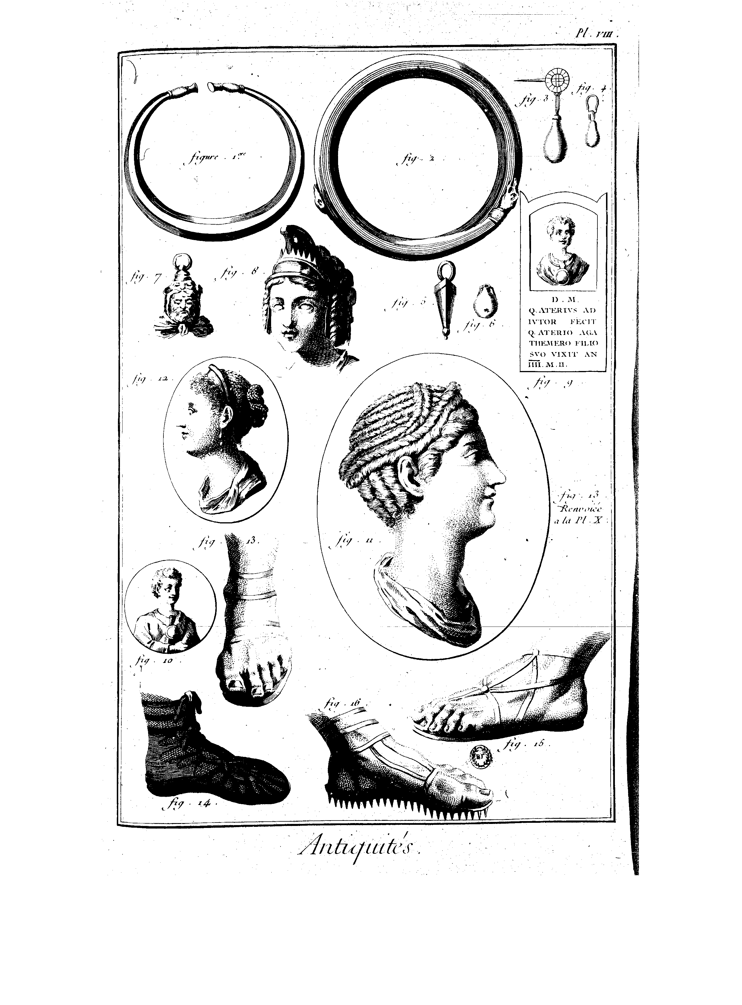 Planches de l'Encyclopédie de Diderot et d'Alembert, volume 1